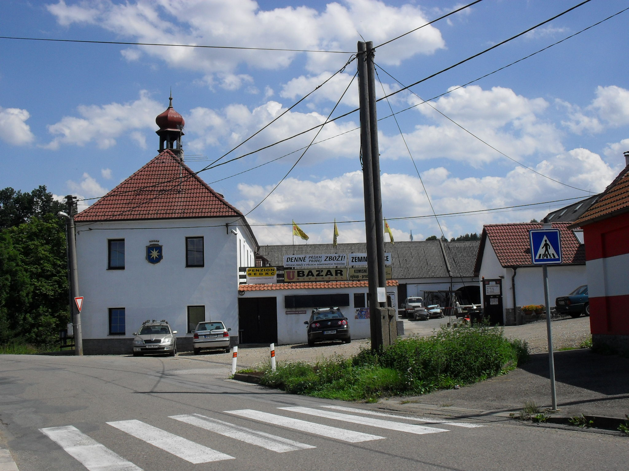 Bedrčský dvůr v Bedrči